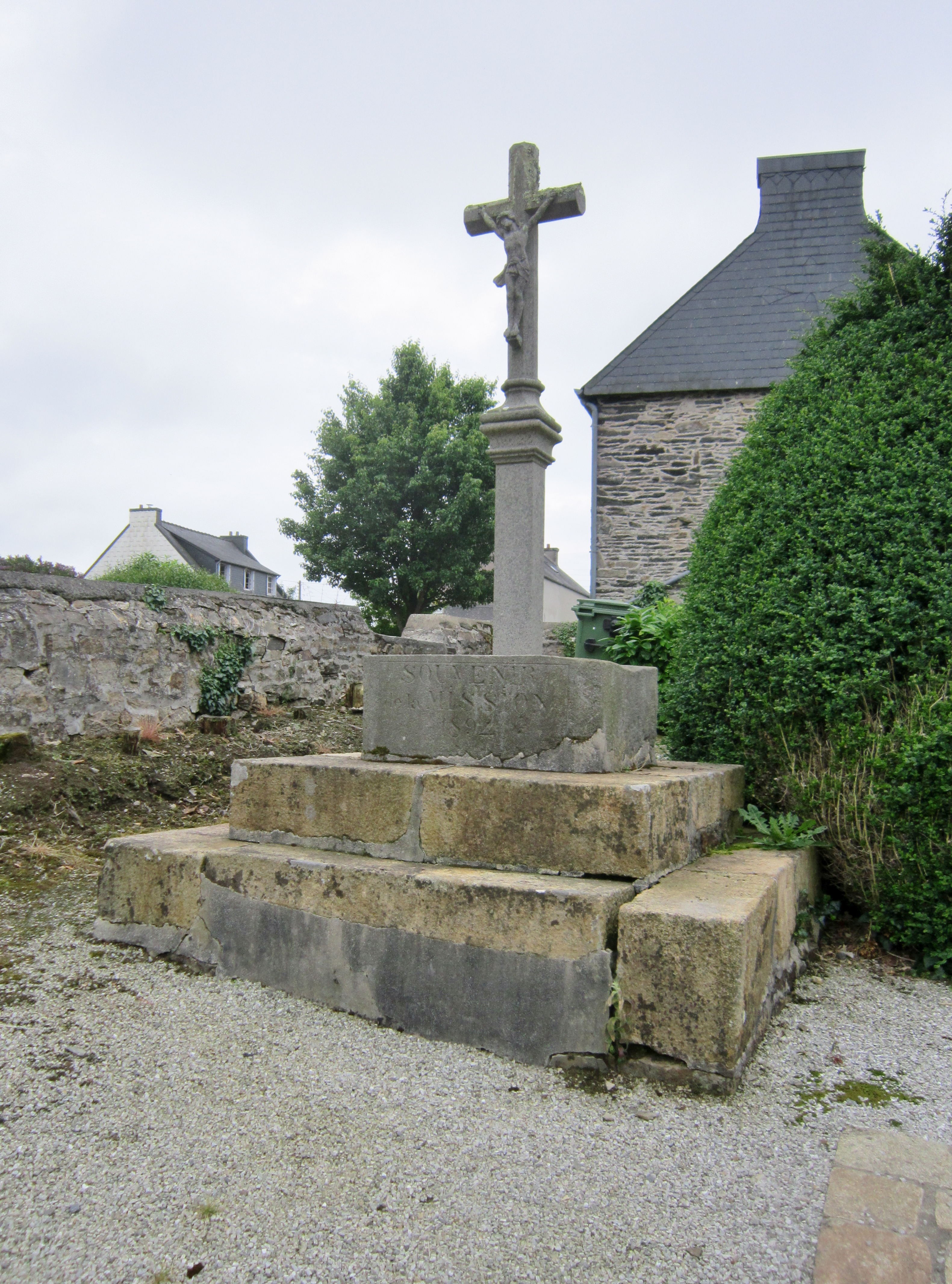 Saint-Urbain (Finistère) : le calvaire de la mission paroissiale de 1892.